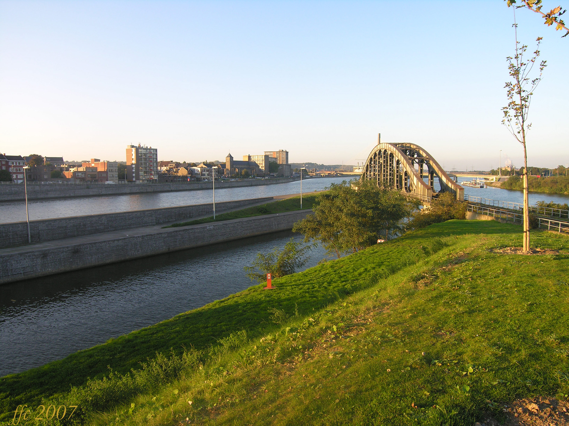 Canal de Monsin Liège